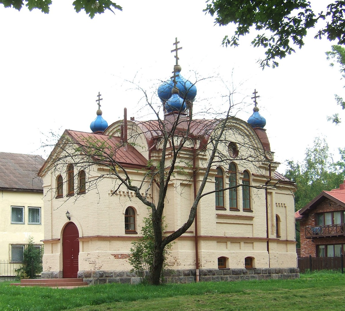 Храм Покрова Богородицы в Букишкес